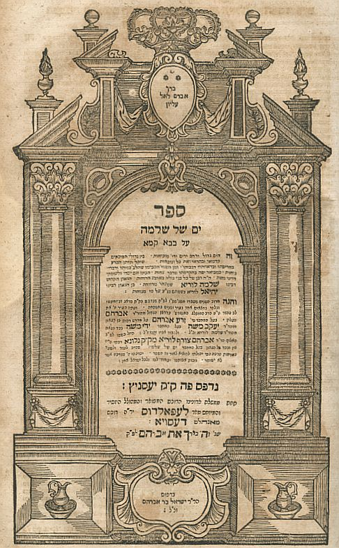 שער ים של שלמה, יעסניץ: דפוס ישראל בר אברהם, ה'תפ"ג